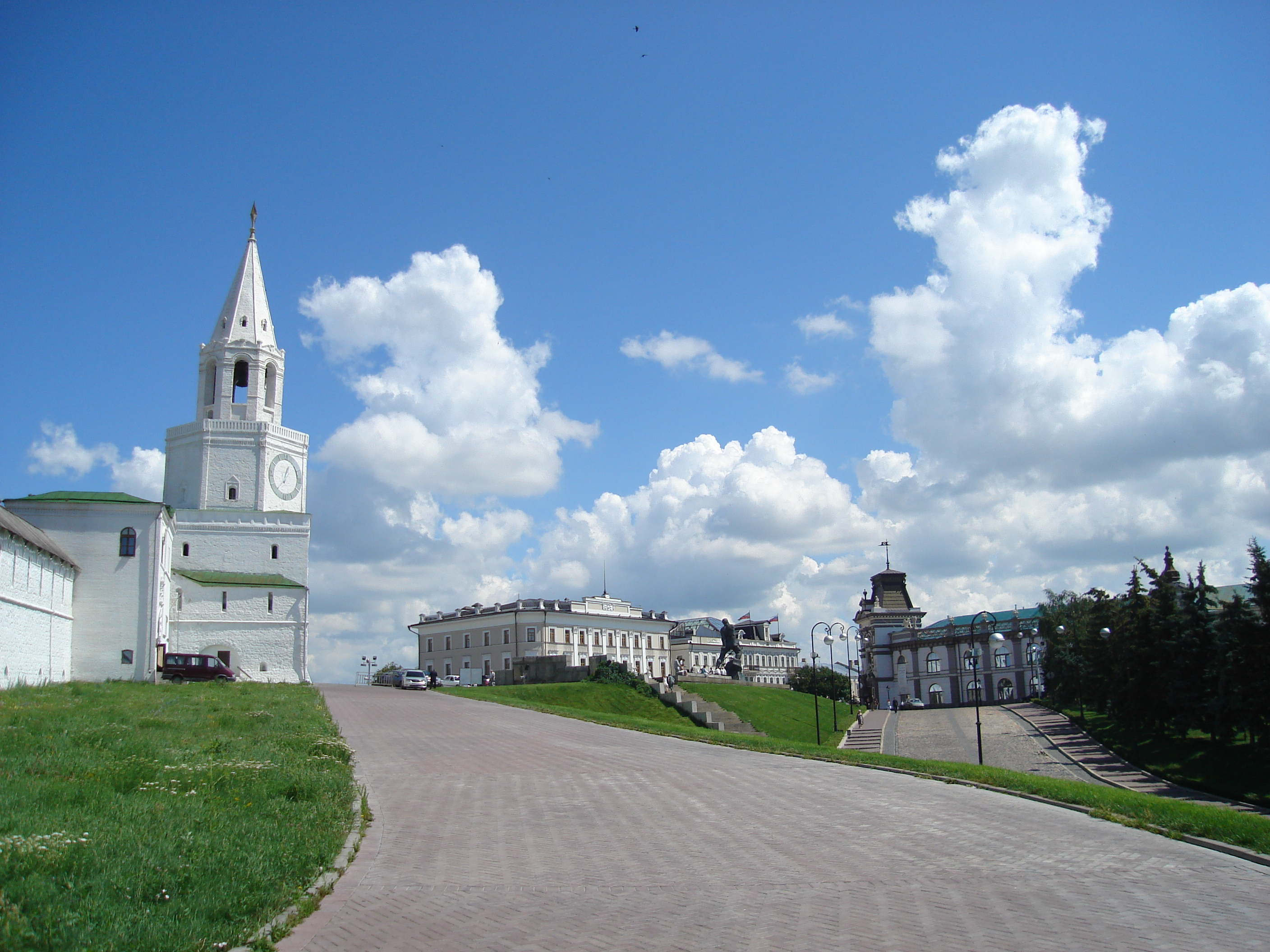 1 May Square, Kazan